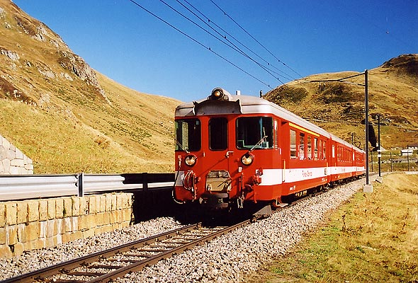 Oberalp-Passhöhe, vor der Einfahrt in die Schutzgalerie